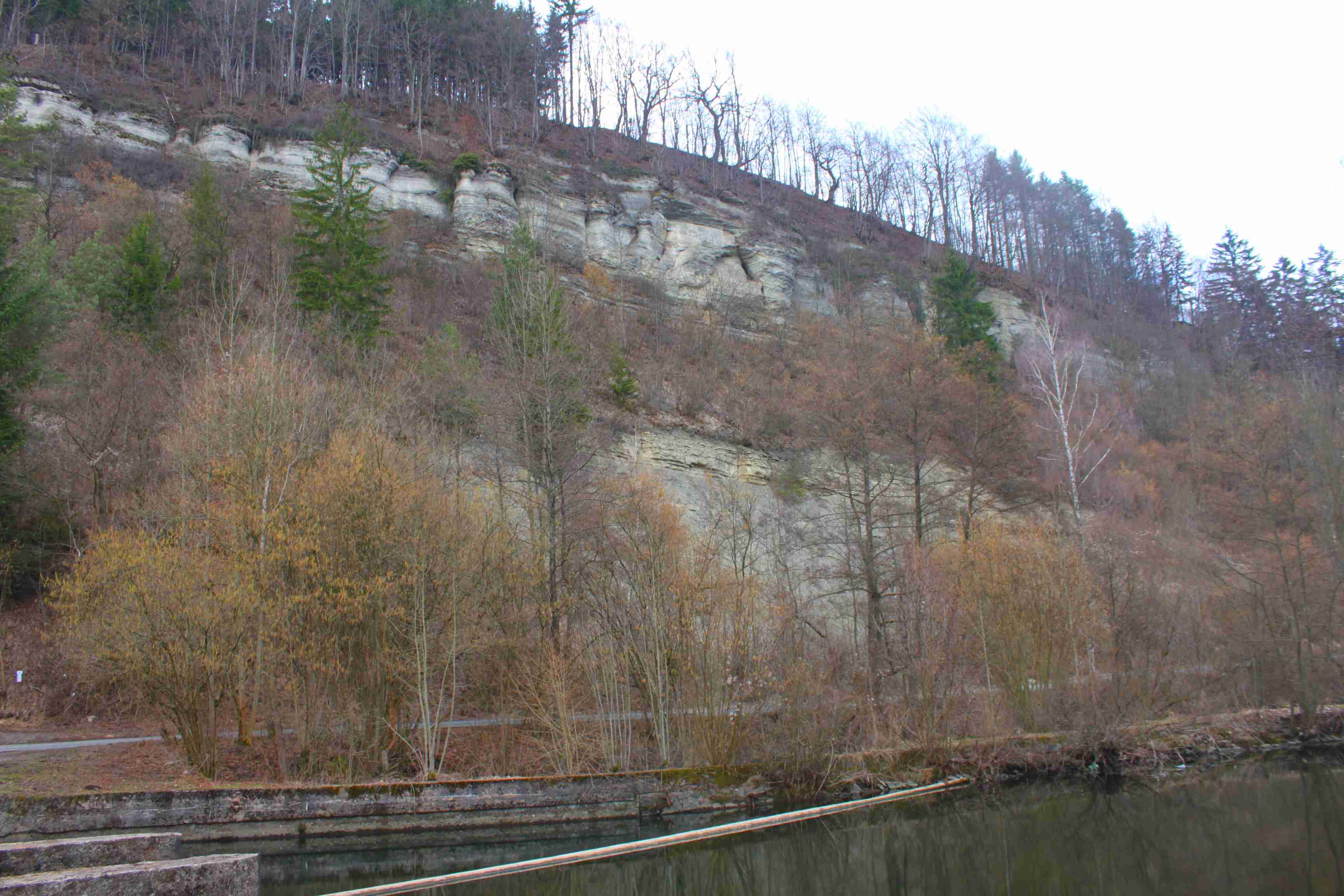 Zeyerner Wand ist ein Prallhang der Ur-Rodach; Teil des Naturschutzgebiets „Rabensteiner Höhe mit Zeyerner Wand“